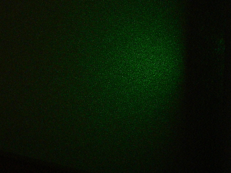 Green laser speckle pattern